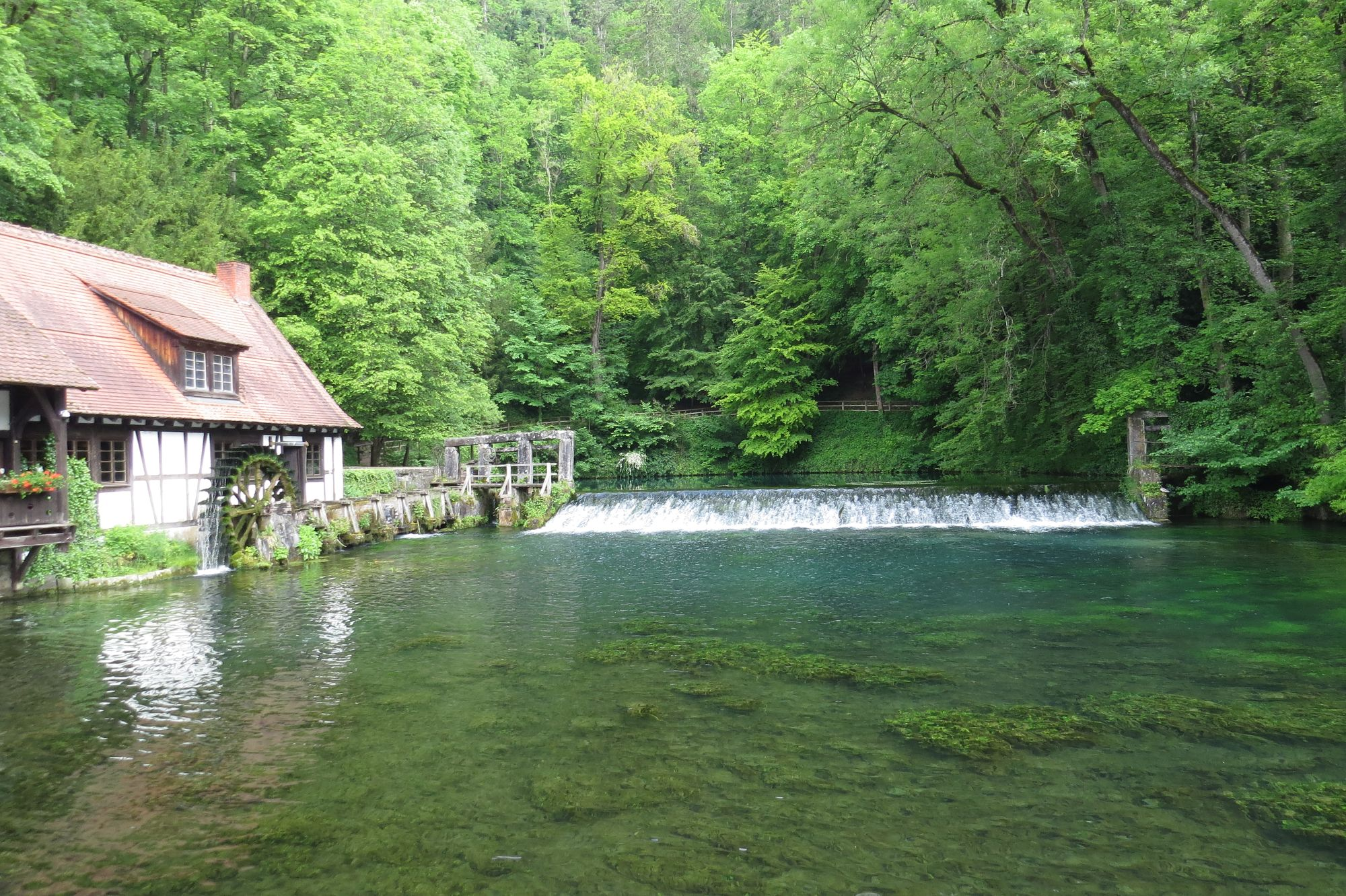 Abfluss des Blautopfs (2015), am linken Bildrand ist das historische Hammerwerk zu sehen